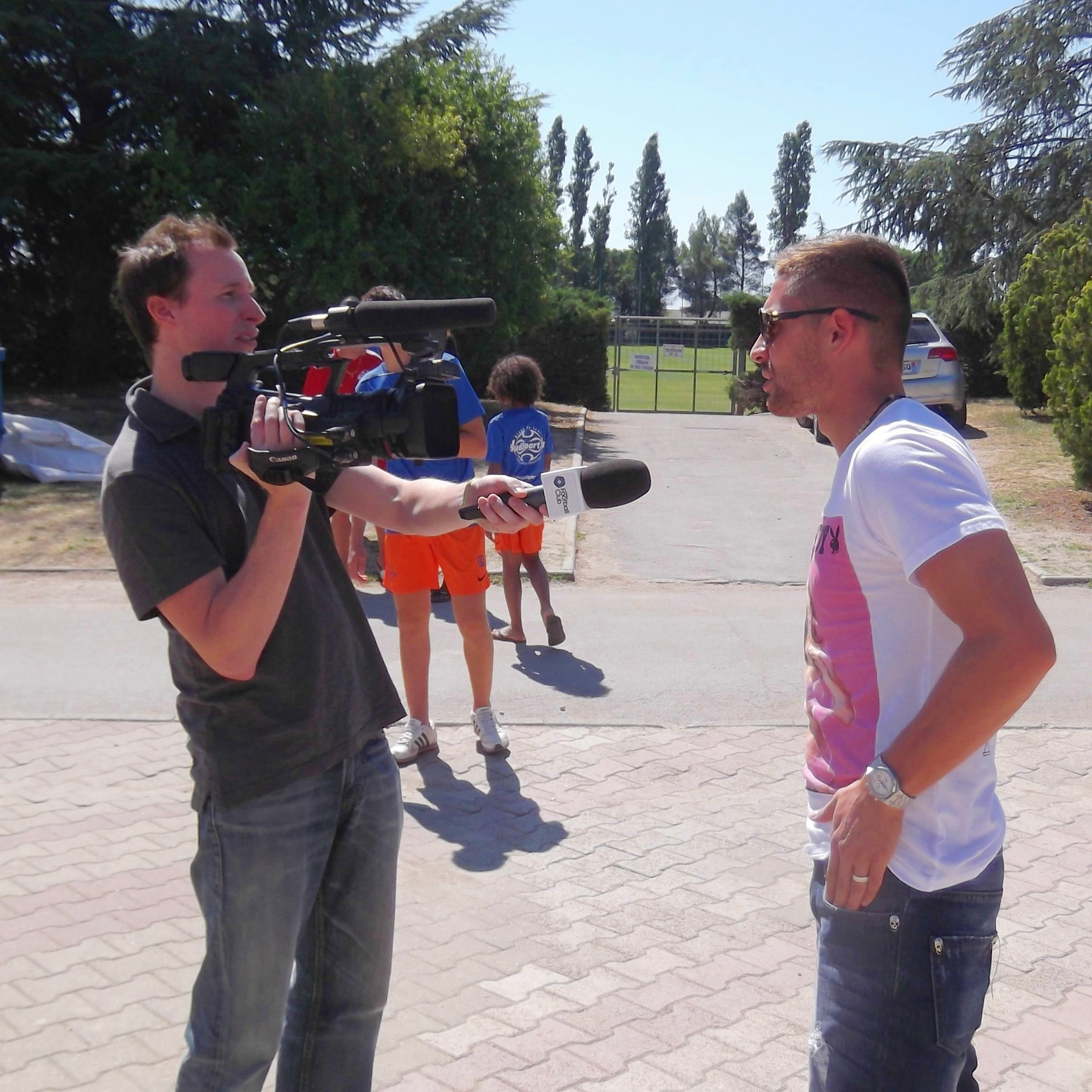 Interview par Canal d'Anthony Mounier.